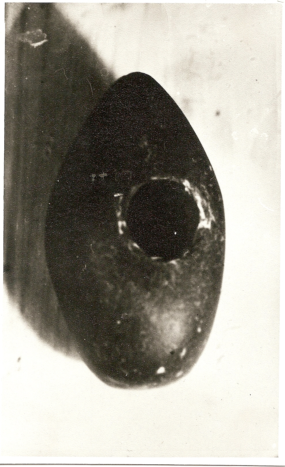 Ciocan confecționat din piatră șlefuită datat la sfârșitul epocii neolitice descoperit în Racovița județul Sibiu, a cărui vârstă a fost apreciată de către arheologul sibian profesor Iuliu Paul, la 3600 ani.